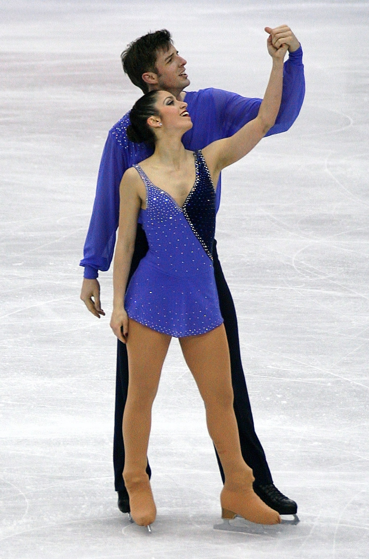 Стефания Бертон и Ондржей Готарек (Италия) на чемпионате мира по фигурному катанию 2012